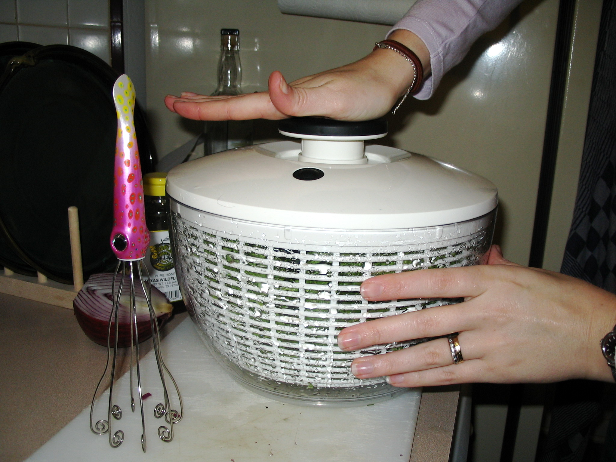 A salad spinner in use